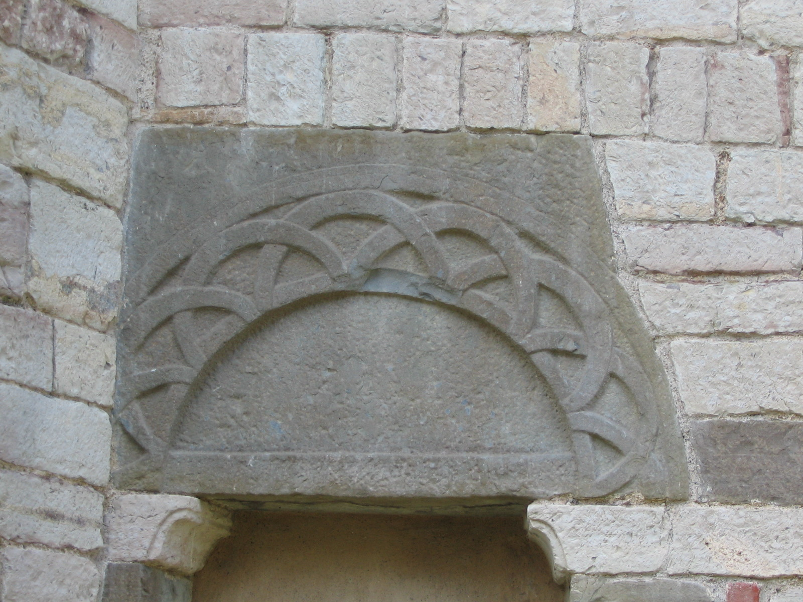 Autore Giorces. San Tomè, lunetta porta murata.